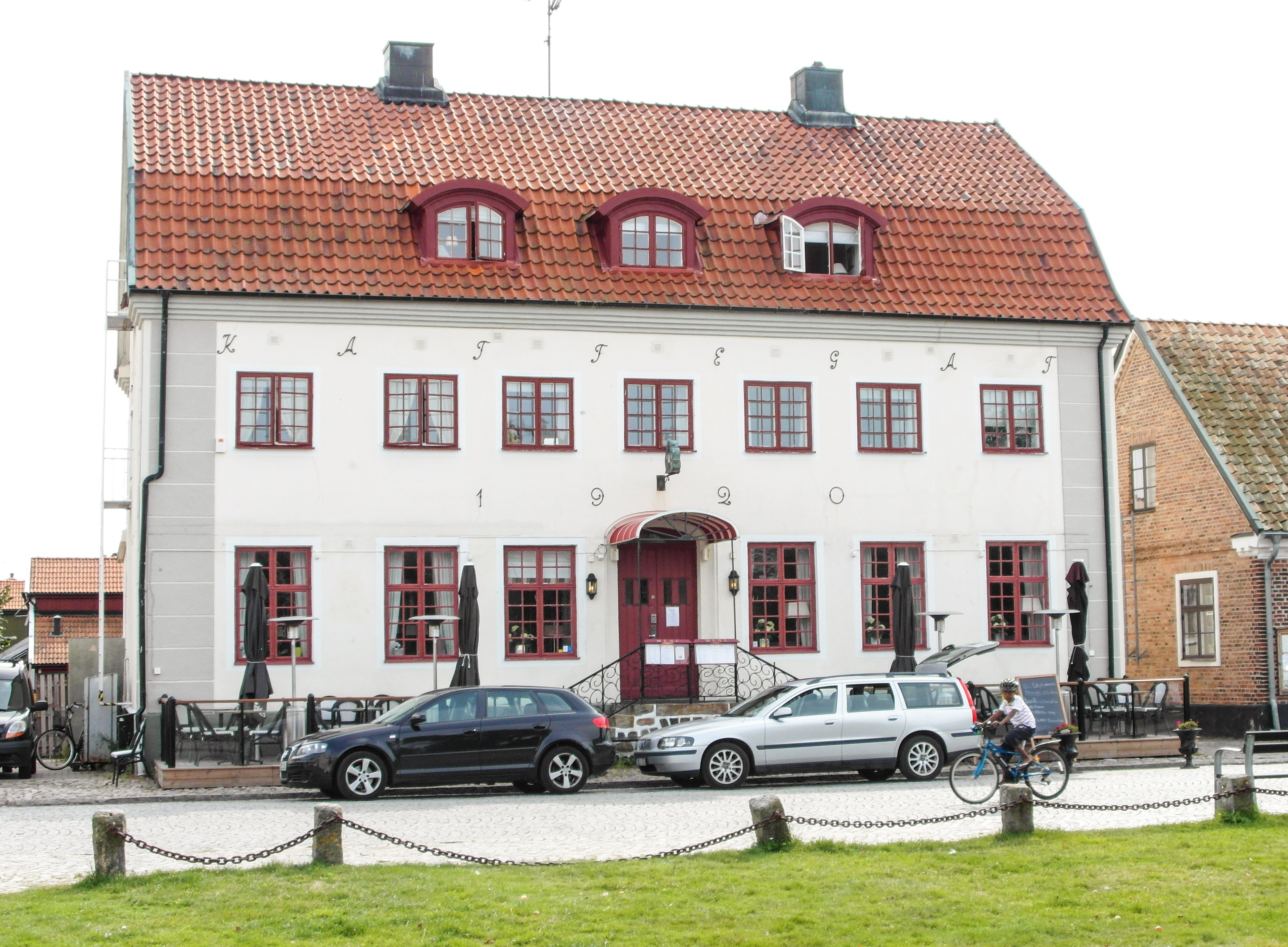 Hotell Kattegat, Torekov, Båstads kommun, augusti 2014. Obs stavningen "Kattegat"